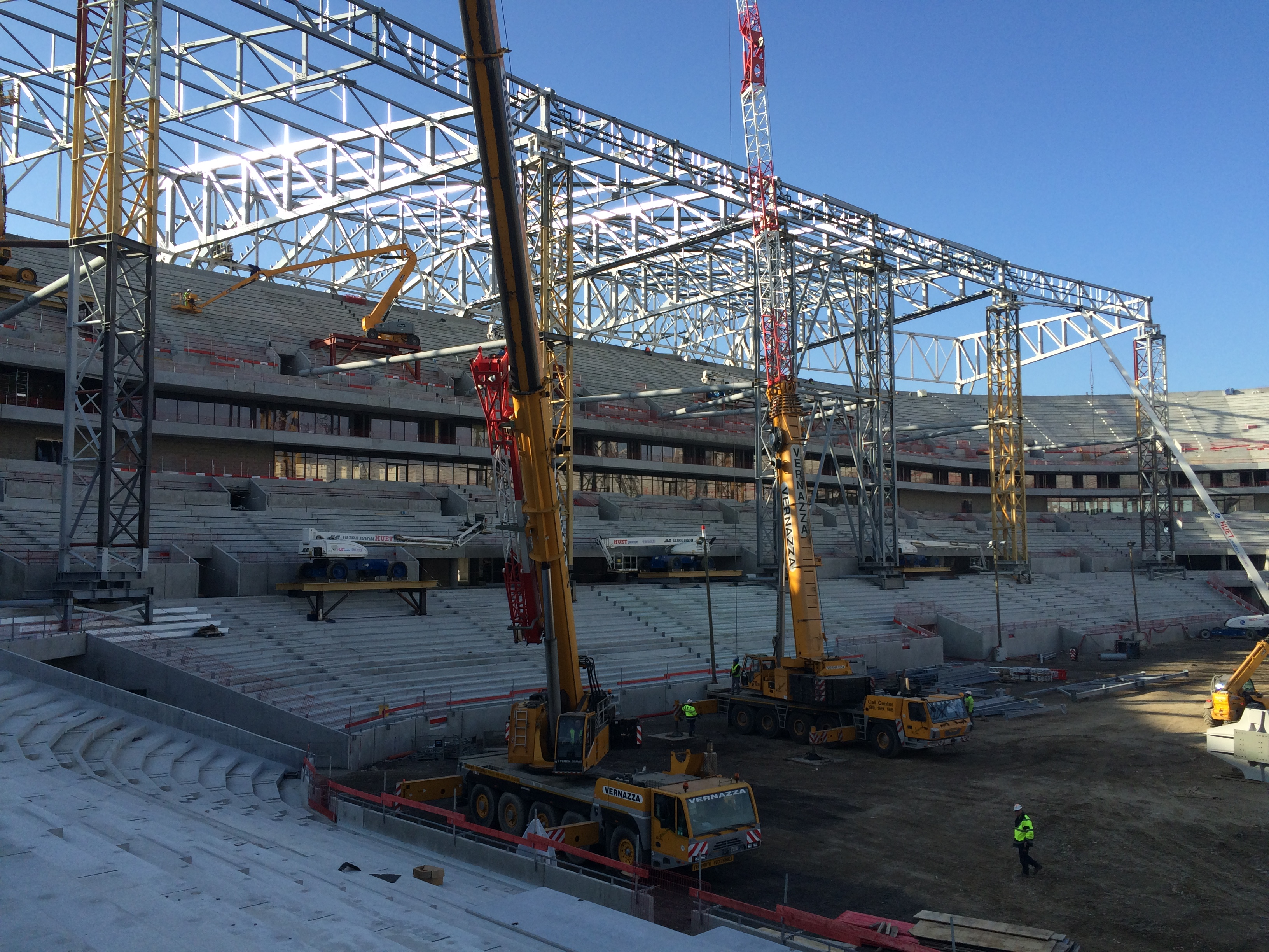 Chantier du Stade des Lumières à Décines-Charpieu, près de Lyon, le 13 février 2015. Intérieur de l'enceinte, vue sur les gradins et les portiques provisoires supportant la pose de la charpente.